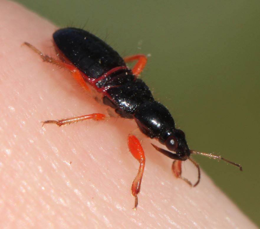 Nymphe von Prostemma guttula am 2. Juli 2018 an der Côte d’Azur